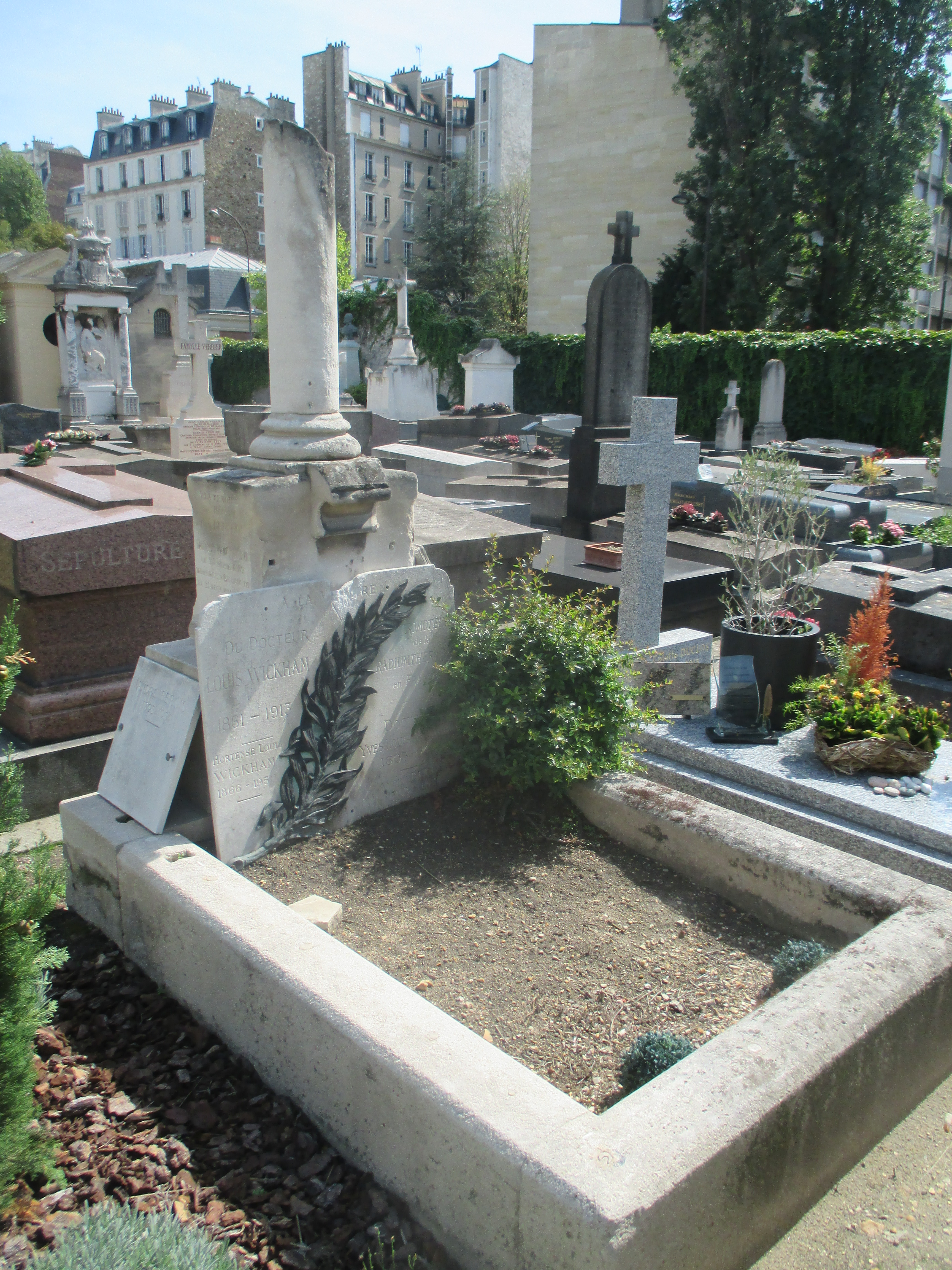 Tombe du docteur Wickham.